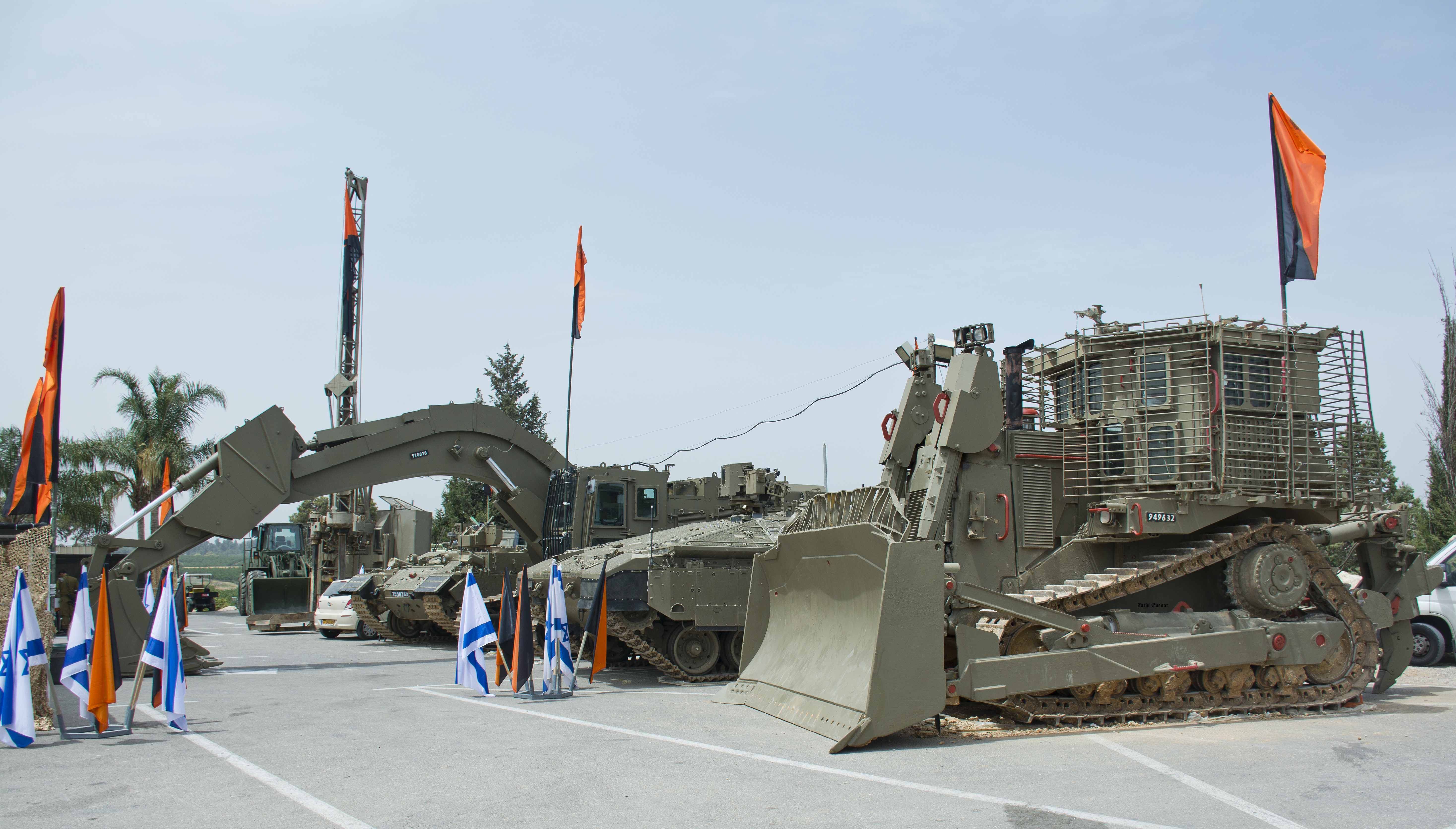 Israel Defense Forces - armored vehicles of the Combat Engineering Corps, from front to back: IDF Caterpillar D9R armored bulldozer, IDF Nammer CEV (engineering variant of the Merkava APC), ACE 349E (armored Caterpillar excavator), IDF Puma CEV, Tatra-Driller, and wheeled loader. Independence Day 2017 צה"ל - כלי רכב קרביים משוריינים של חיל ההנדסה הקרבית, מהחזית אחורה: דחפור די-9 משוריין, נמ"ר הנדסי, מחפר ממוגן קטרפילר 349, נגמ"ש הנדסי פומ"ה, טאטרה-דרילר (מקדח בורות), ויעה אופני. יום העצמאות 2017